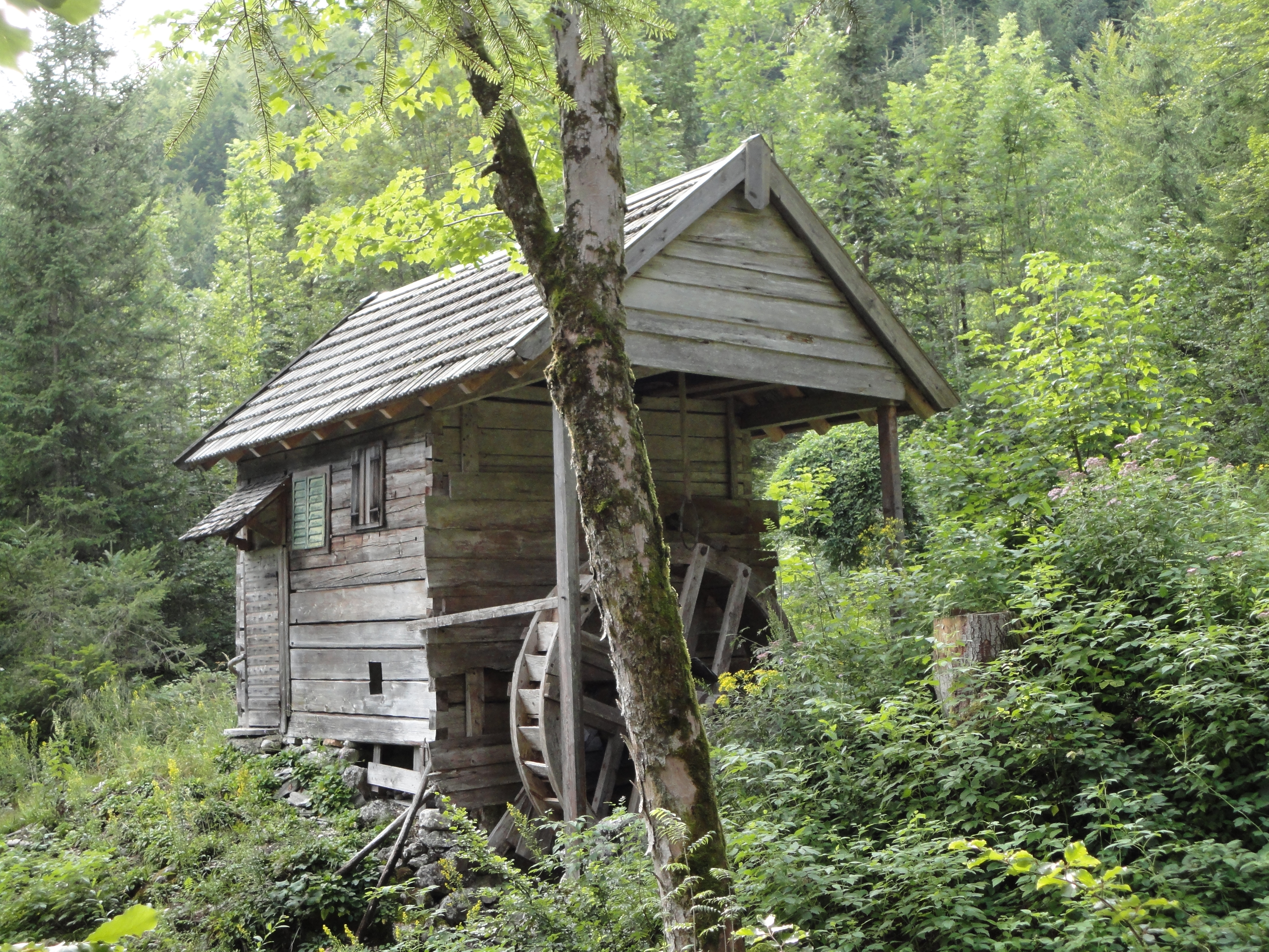 Schachnermühle in Grundlsee